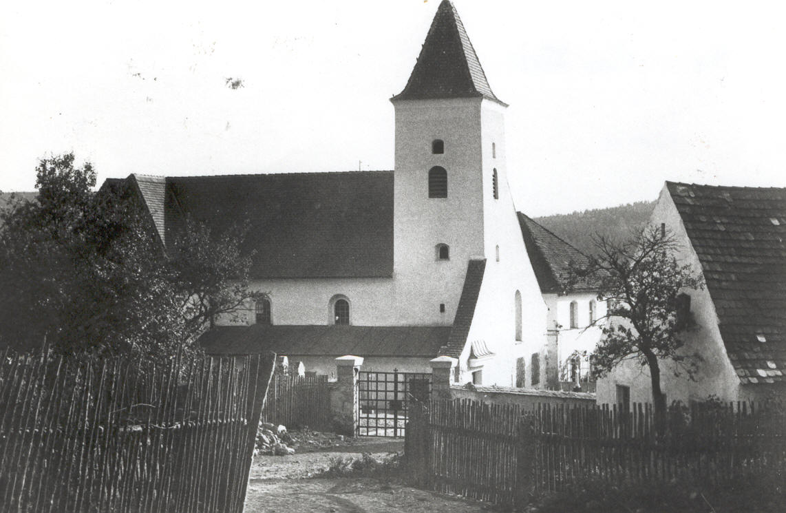 Kirche Maria Magdalena in Gleiritsch nach dem Anbau 1928